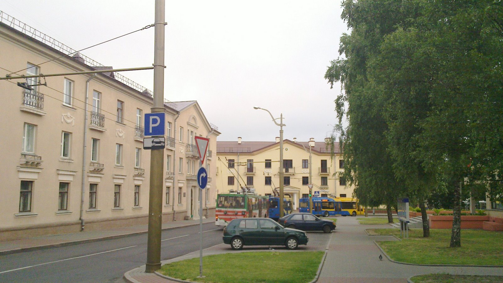 ул.Октябрьская